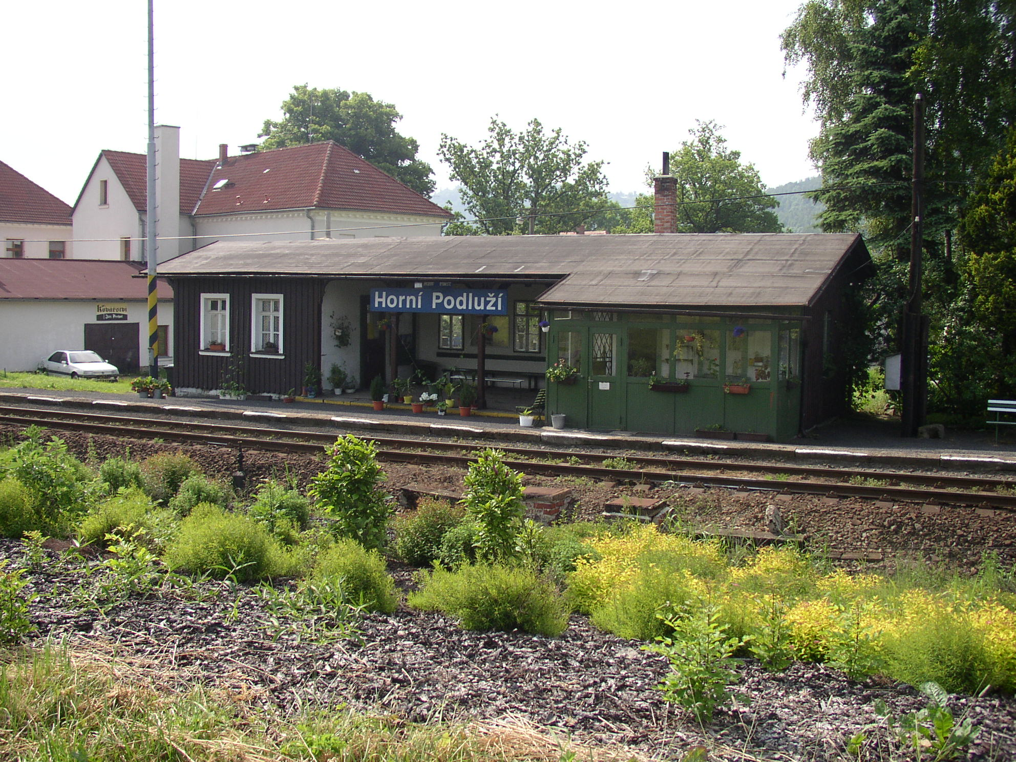 Vlaková zastávka Horní Podluží